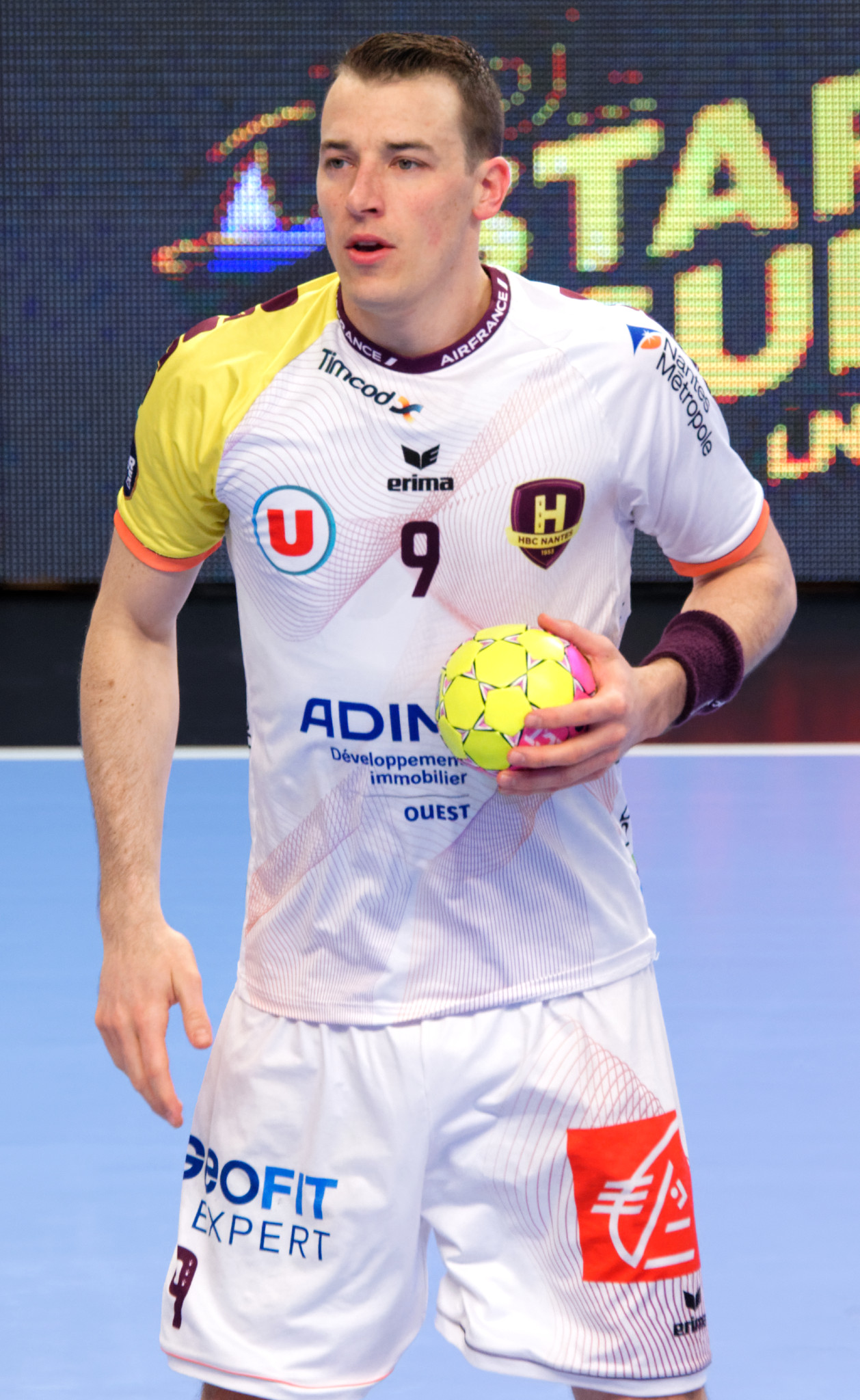 Rencontre de championnat entre le PSG et le HBC Nantes. A Coubertin, le 14 décembre 2018.